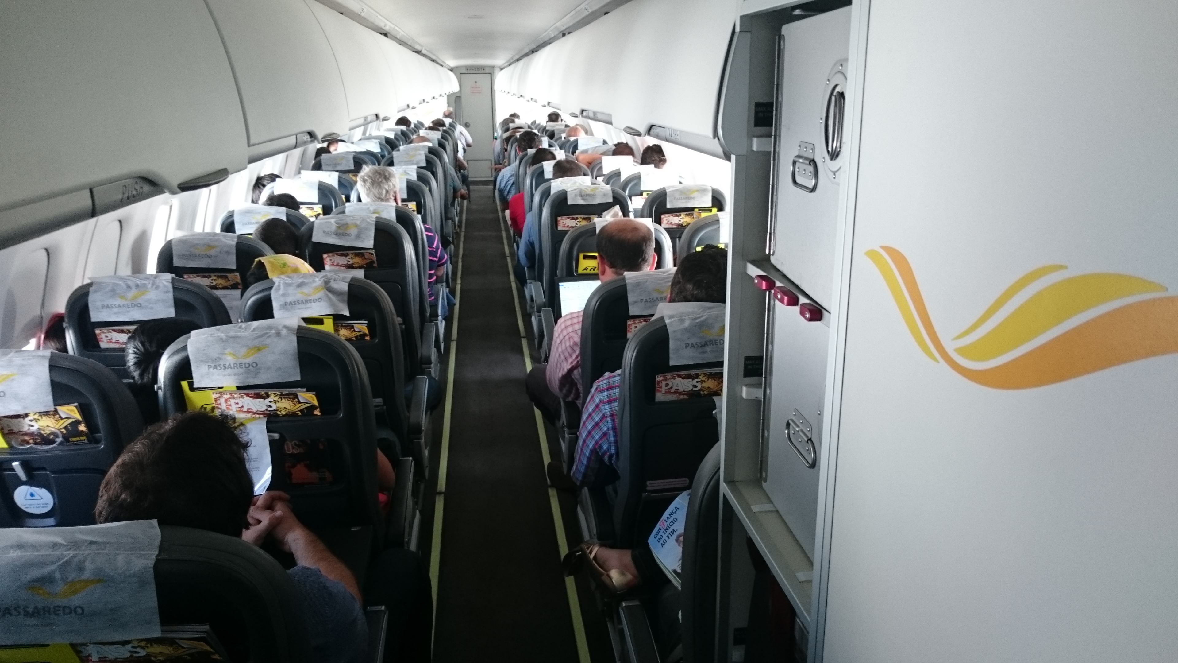 Interior ATR 72-600 Passaredo